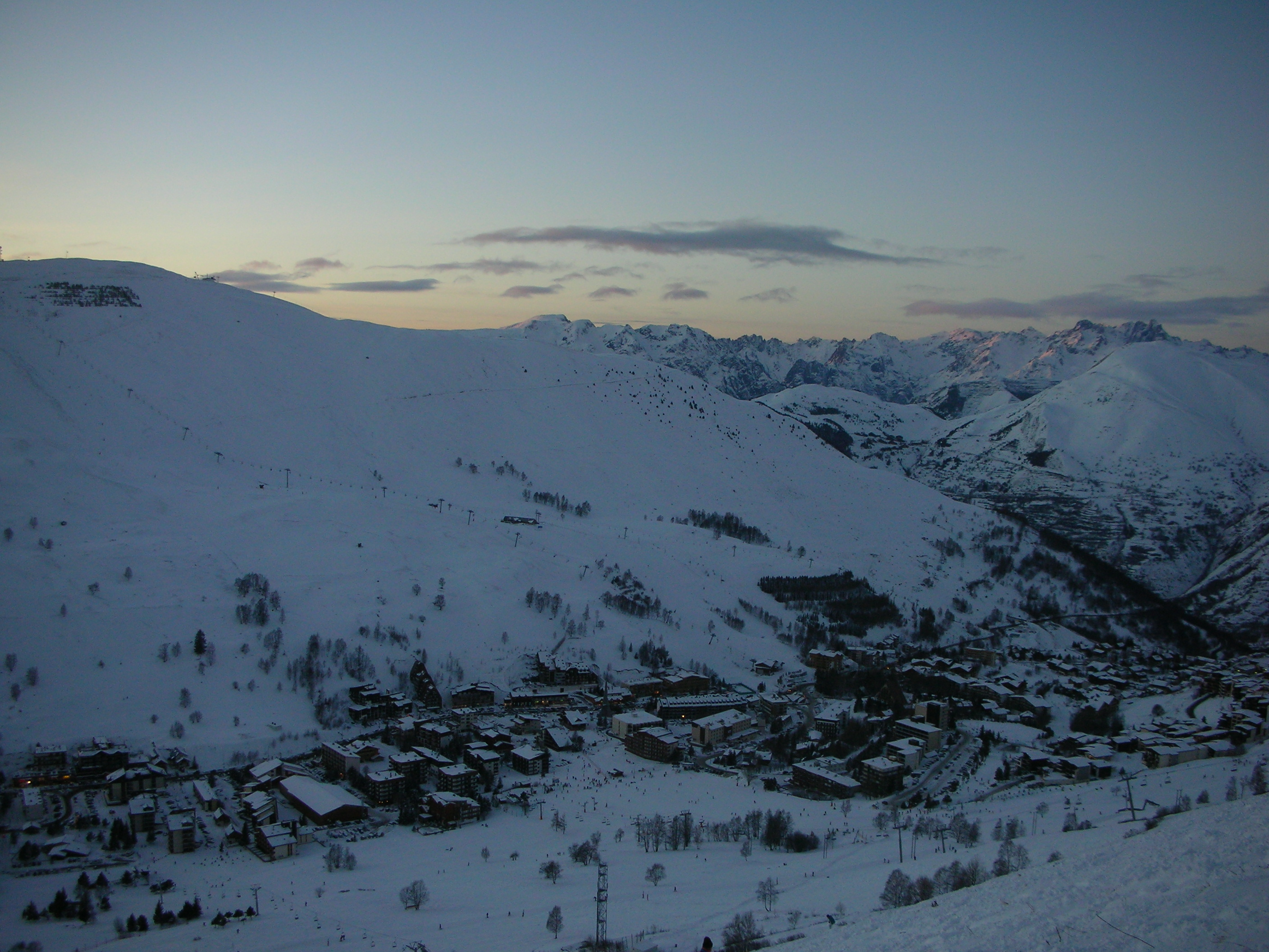 38860 Mont-de-Lans, France